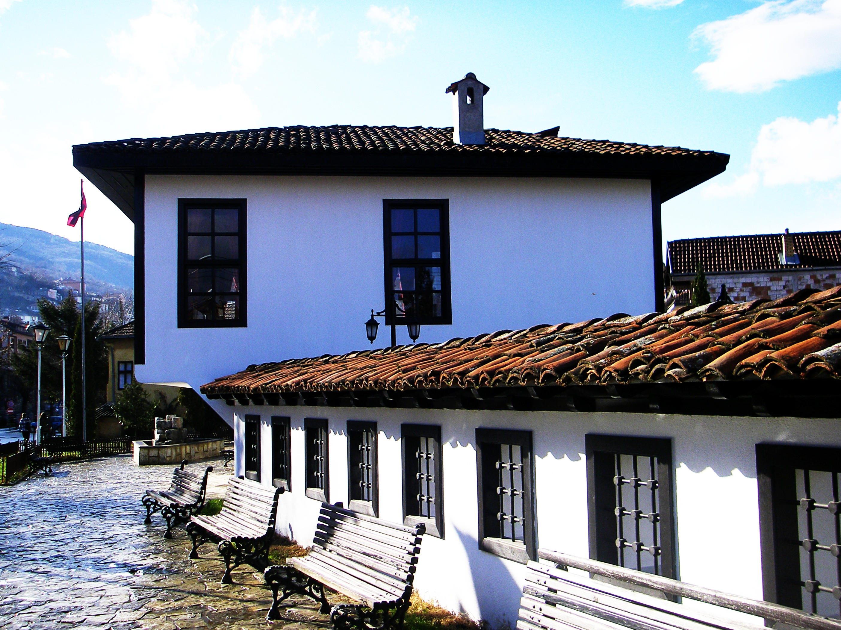 Lidhja Shqiptare e Prizrenit ishte ai moment krucial gjatë të cilit të gjitha energjitë e popullit tonë, patriotizmi i tij i pashoq, dashuria për atdheun, për tokën, për gjuhën, përpjekjet e tij politike dhe diplomatike e bashkuan atë si një grusht të vetëm për t’u bërë ballë turqve, serbëve, malazezve, gjermanëve, austro-hungarezëve, grekëve, pse që të gjithë këta së toku ishin bashkuar kundër popullit shqiptar. Lëvizja Kombëtare Shqiptare mbështetjen politike, morale, materiale e luftarake duhej ta kërkonte te shtresat e gjera të popullit dhe te bashkimi i të gjitha forcave shoqërore e politike të kombit shqiptar, pa dallim feje, krahine e përkatësie shoqërore.